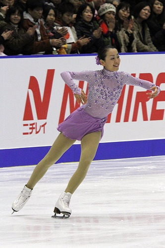 Ма́о Аса́да на 2011 NHK Trophy .